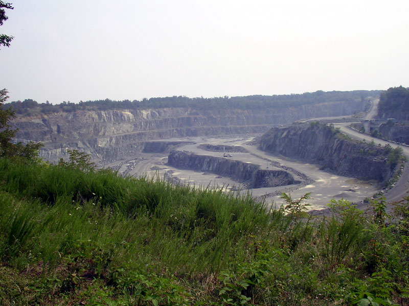 Luck Stone Quarry bei Leesburg, Virginia